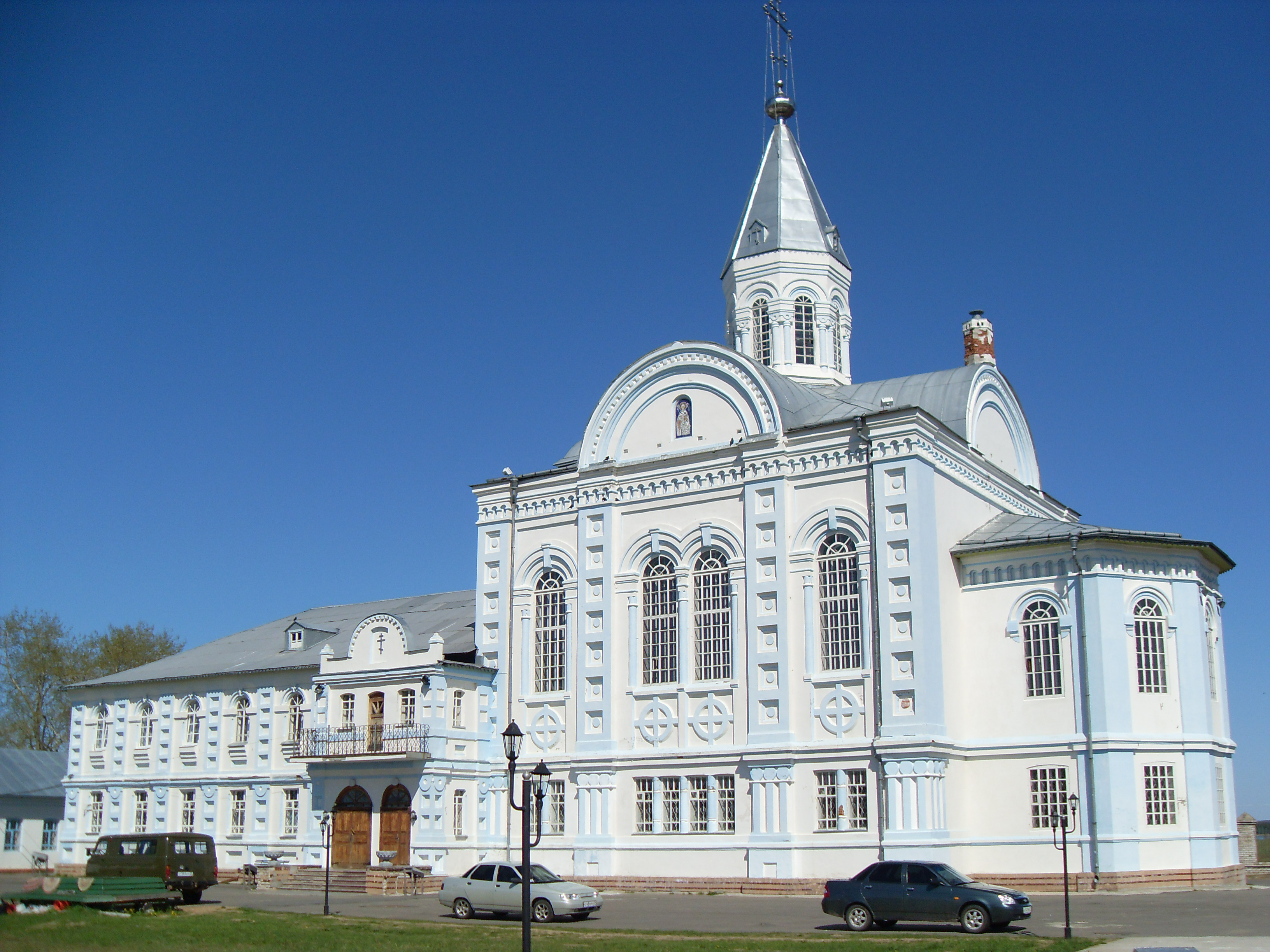 Храм Лонгина в Коряжемском монастыре